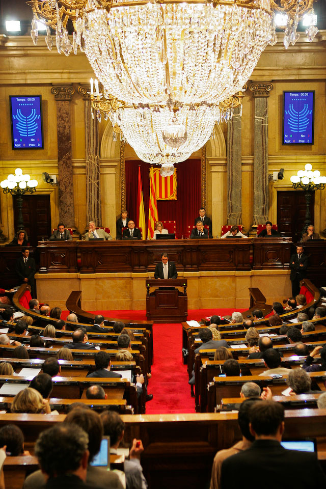 Foto: Parlament de Catalunya. Job Vermeulen.